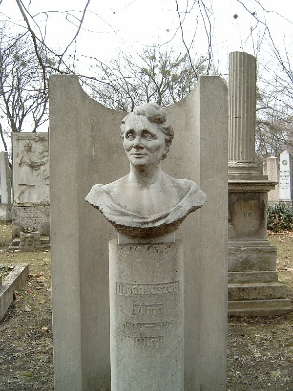 Medgyaszay Vilma (Arad, 1885. máj. 3. – Bp., 1972. ápr. 5.) színésznő sírja Budapesten. Kerepesi temető: 34/1-1-35 [szobrász: Kunvári Lilla, 1952, felállítva 1974]. Lilla Kunvári (1897–1984) DescriptionHungarian sculptressDate of birth/death 26 July 1897 12 August 1984Location of birth/death Budapest BudapestWork period1923–Work location Budapest, Paris (1927–1934)Authority control : Q26247949 VIAF: 38315826 ISNI: 0000 0000 2679 9253 LCCN: n84094193 RKD: 301531 WorldCat creator QS:P170,Q26247949